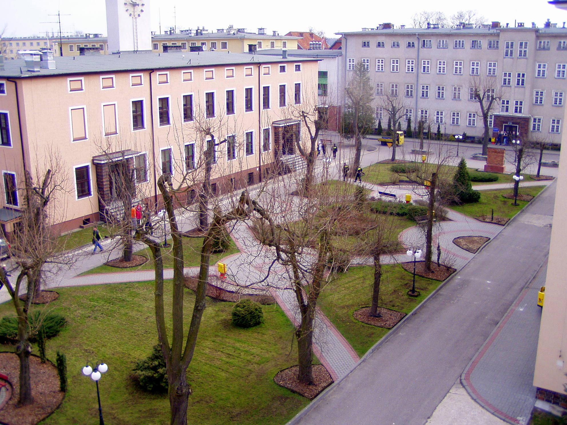 Główny dziedziniec Wyższej Szkoły Policji w Szczytnie